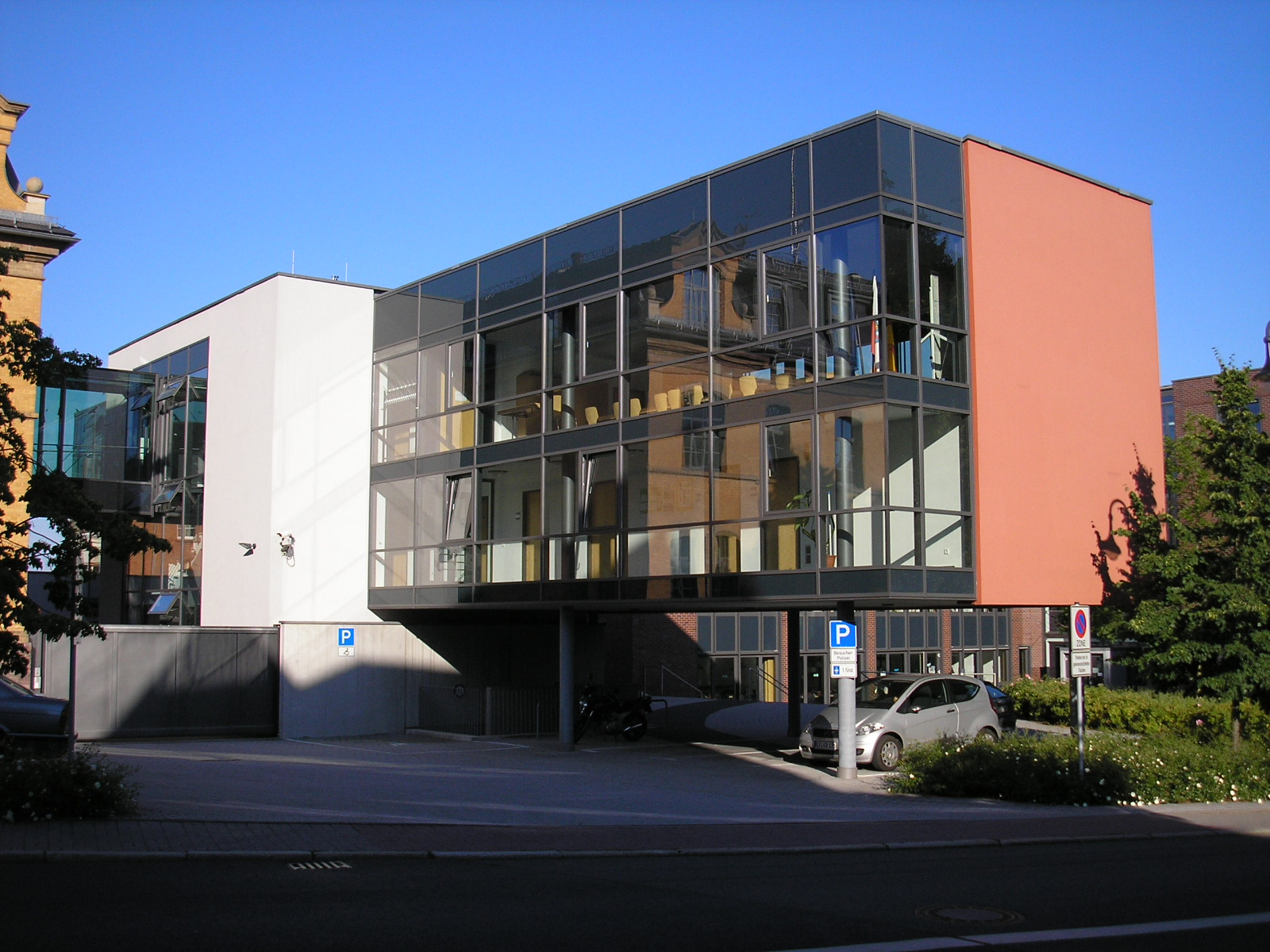 Neuer Anbau der Polizeiwache Ilmenau (Thüringen).